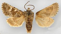 Psammopolia ochracea male